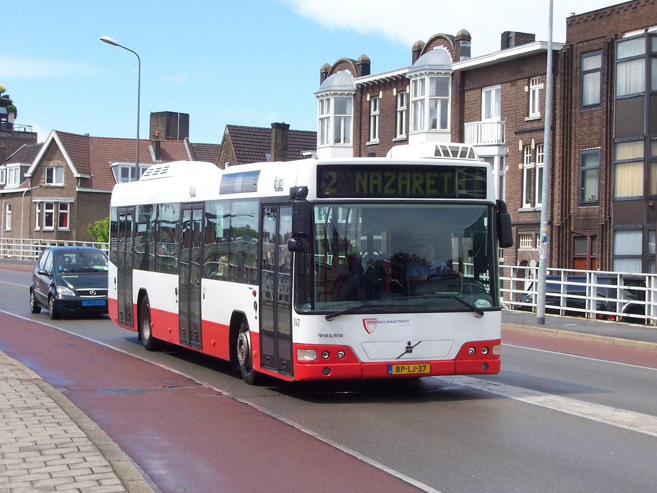 Veolia transport in Maastricht, Volvo bus.